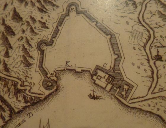 Fortificazione triangolare del borgo di origine Viscontea